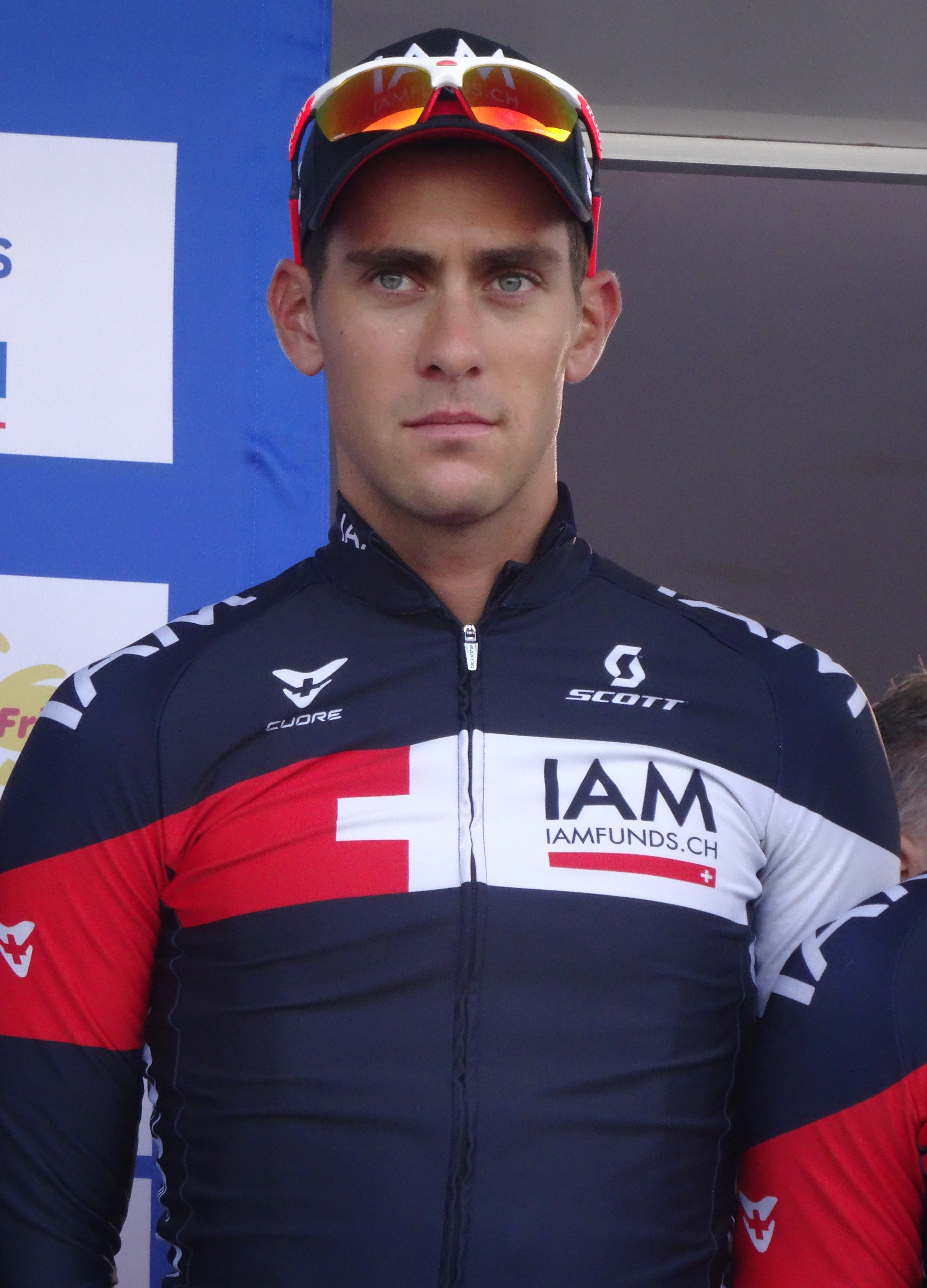 Reportage réalisé le dimanche 21 septembre à l'occasion du départ et de l'arrivée du Grand Prix d'Isbergues 2014 à Isbergues, Nord-Pas-de-Calais, France.